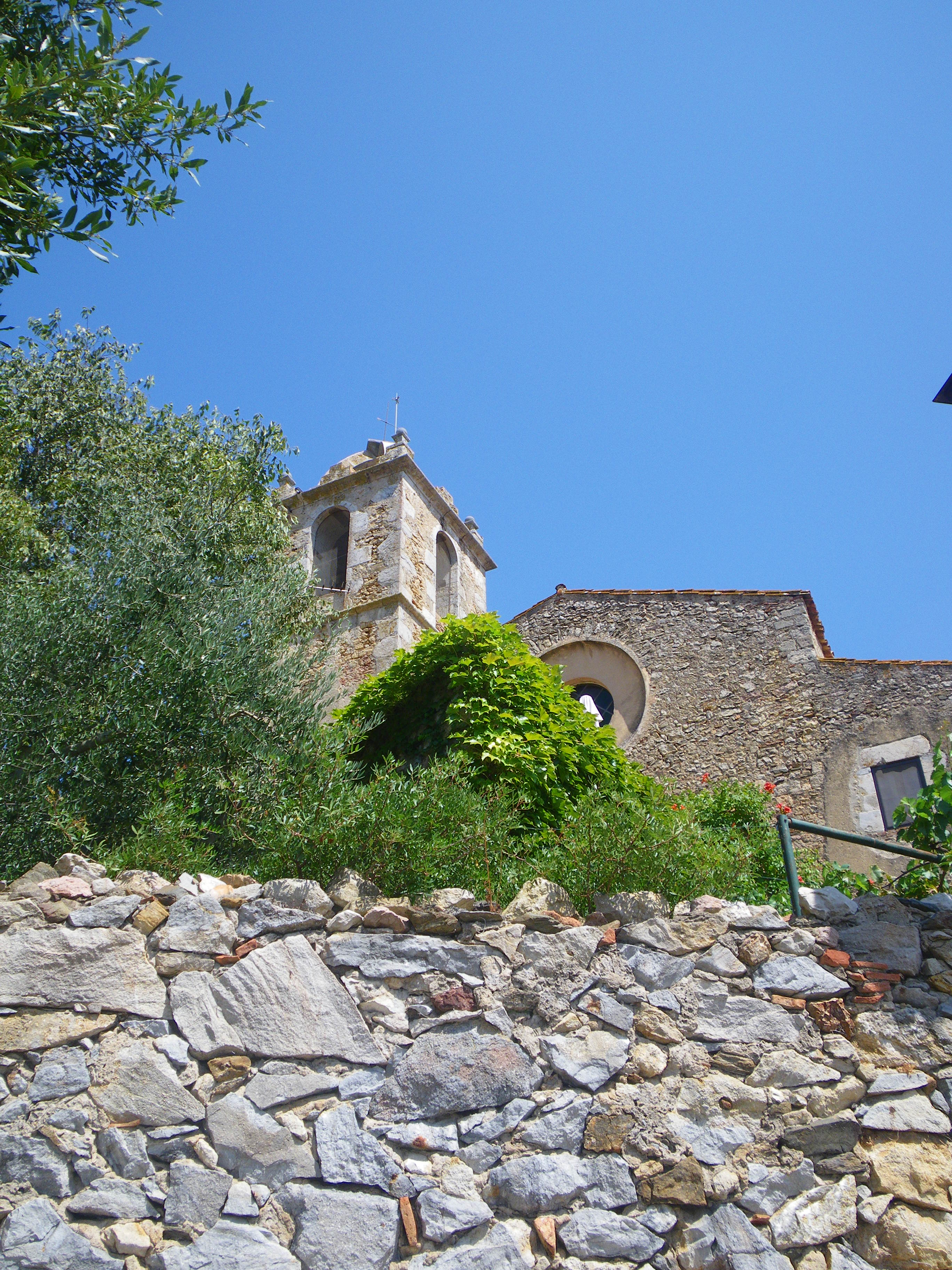 Nucli antic de Llofriu, Església de St.Fruitós